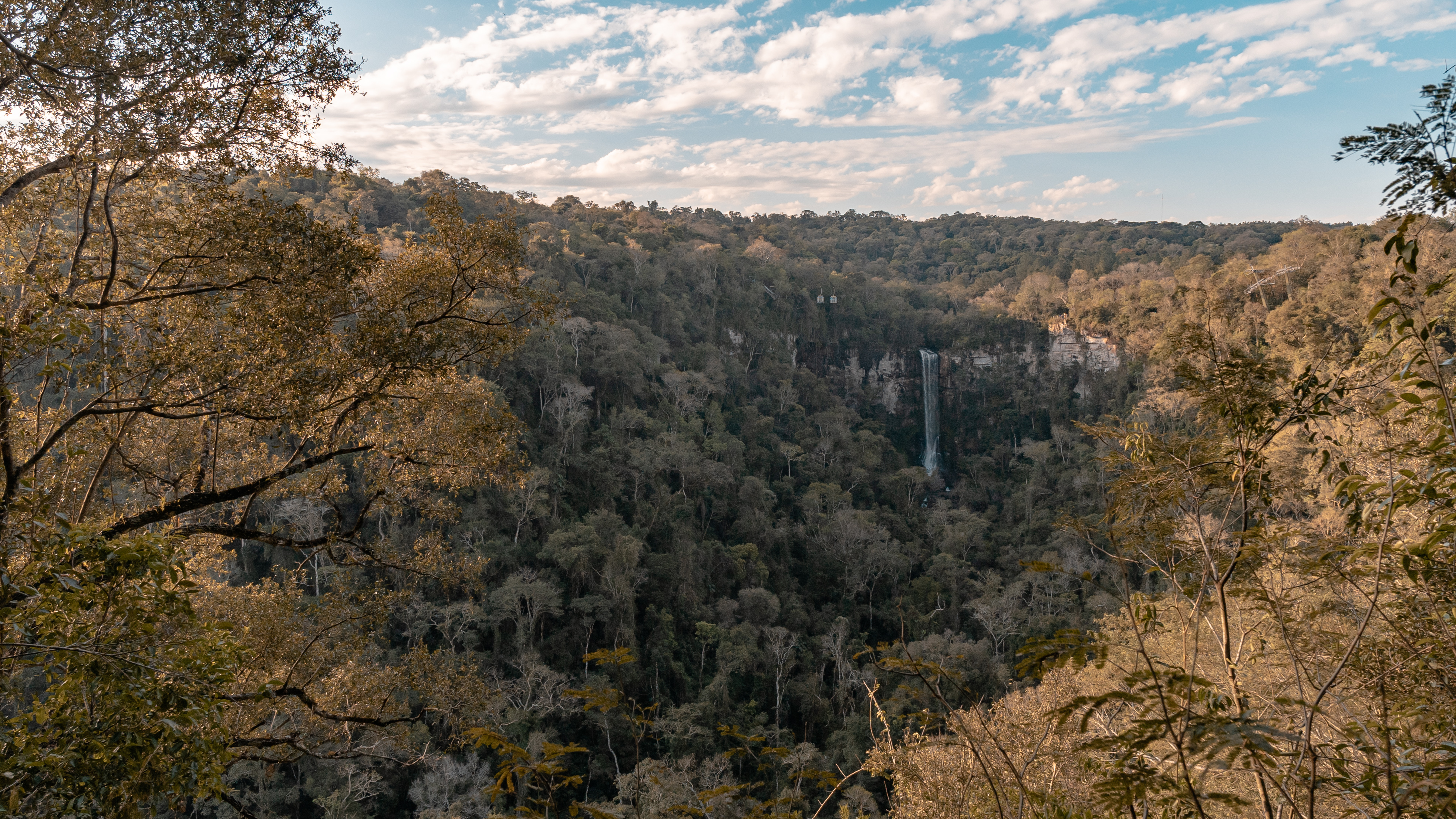 Vista desde uno de los miradores que se hallan en el Municipio de Salto Encantado en Misiones, Argentina